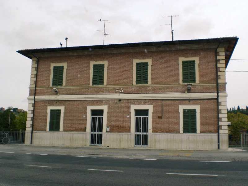 Fabbricato viaggiatori della FS di Buonconvento. Io sono l'autore ho caricato l'immagine con il tiket nÂ° 2008101410040183